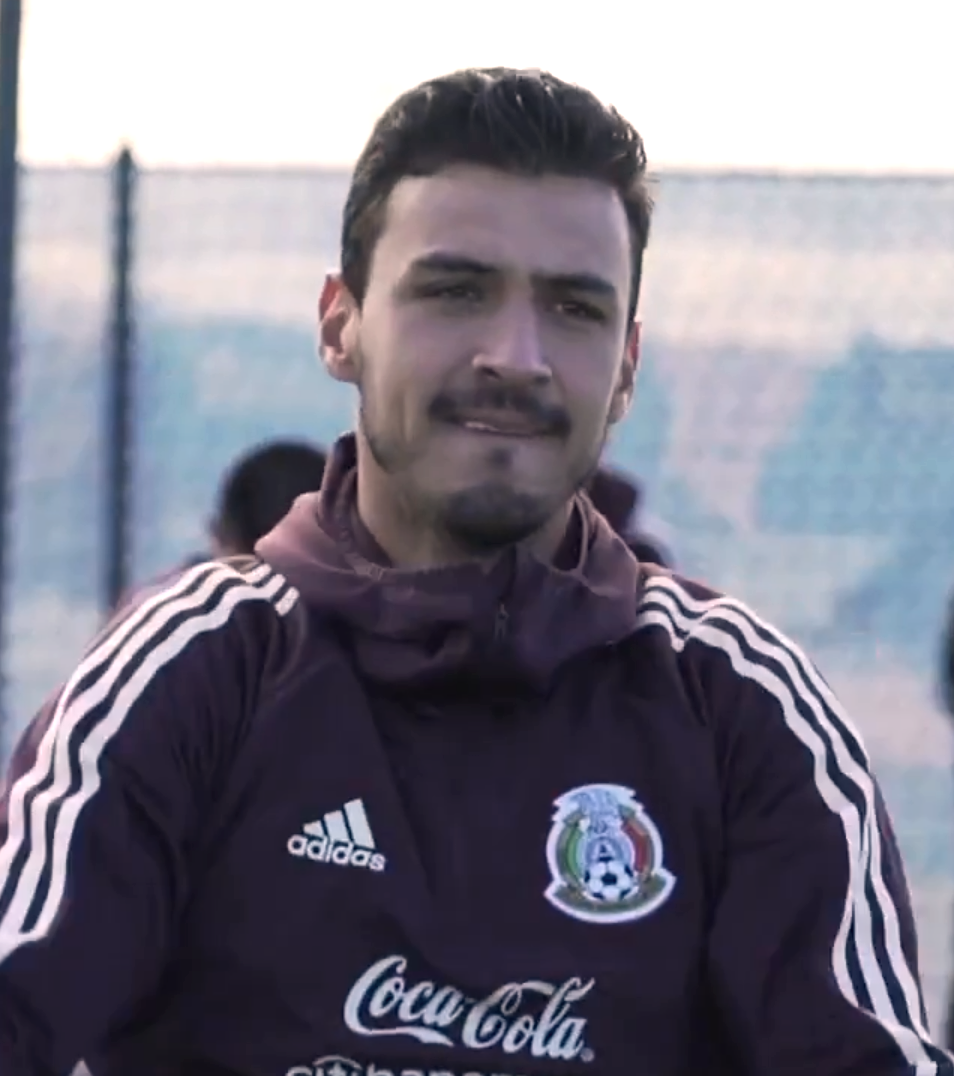 Oswaldo Alanís en 2018.